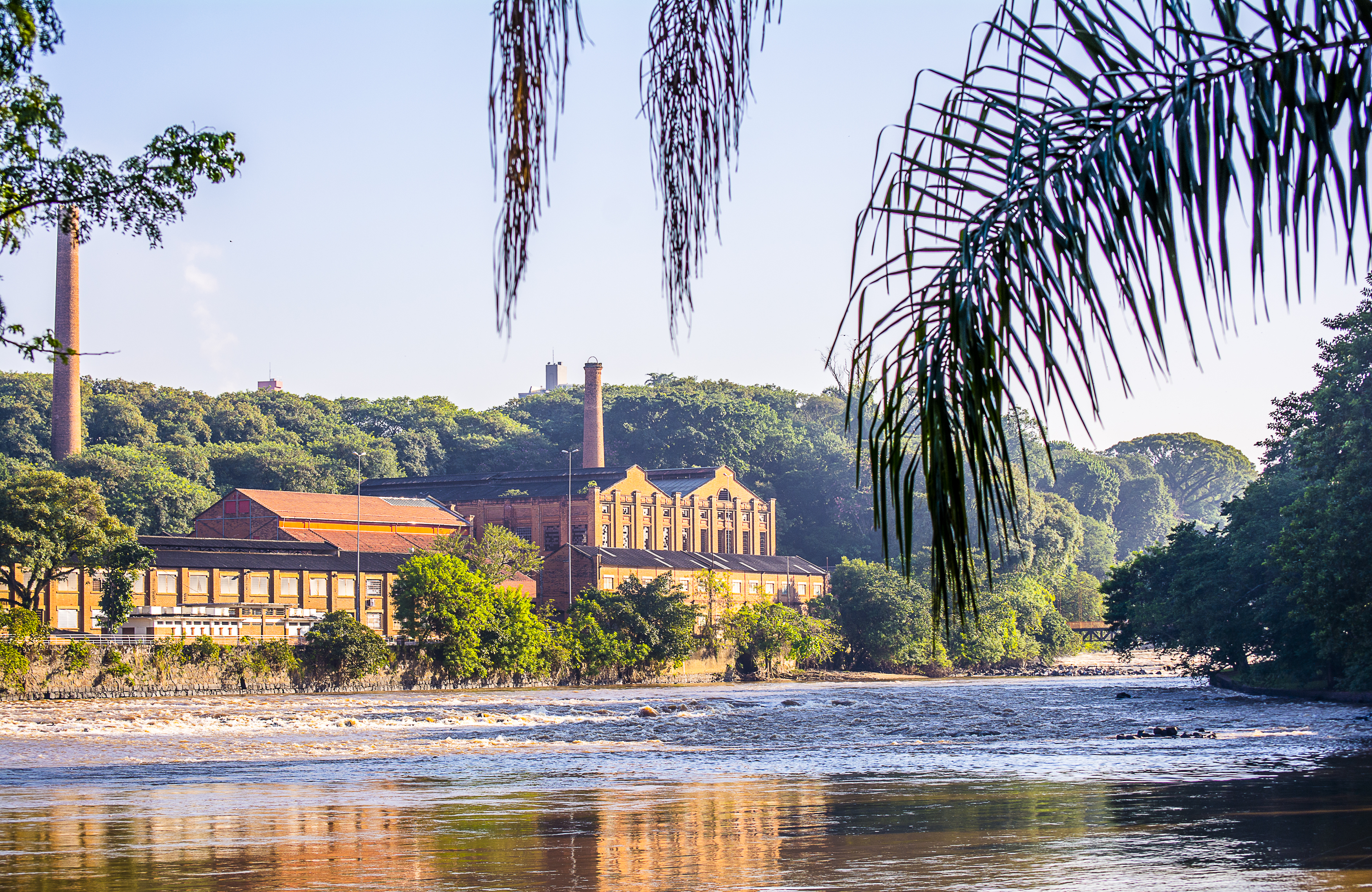 Antiga Usina de Açúcar fundada em 1881 às margens direita do Rio Piracicaba em Piracicaba SP Brasil. Hoje importante Centro Cultural Cultural property Q10272936, Piracicaba, São Paulo (state), Brazil Q10272936, P727: CONDEPHAAT ID: engenho-central